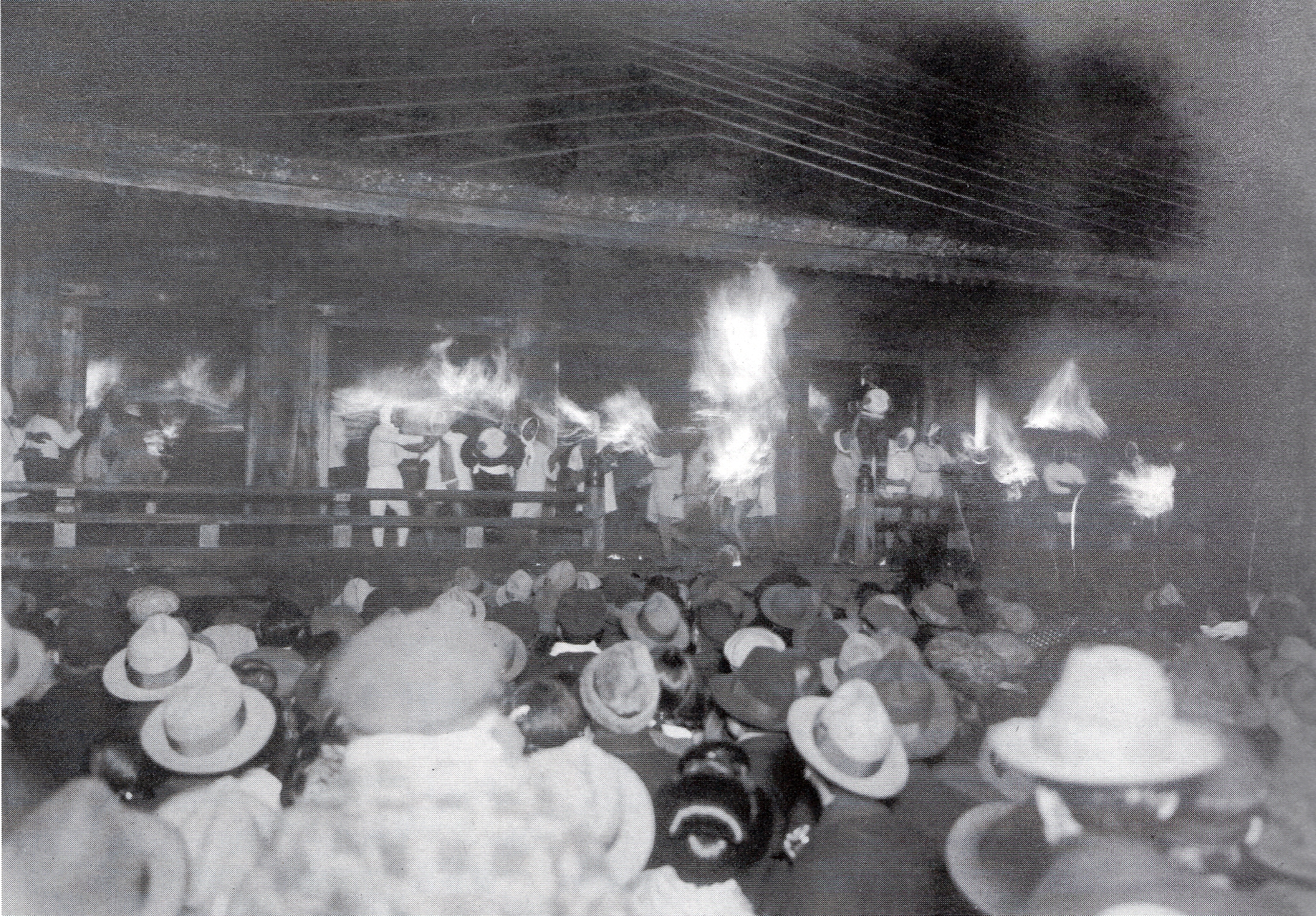 滝山寺鬼まつり。1932年頃。